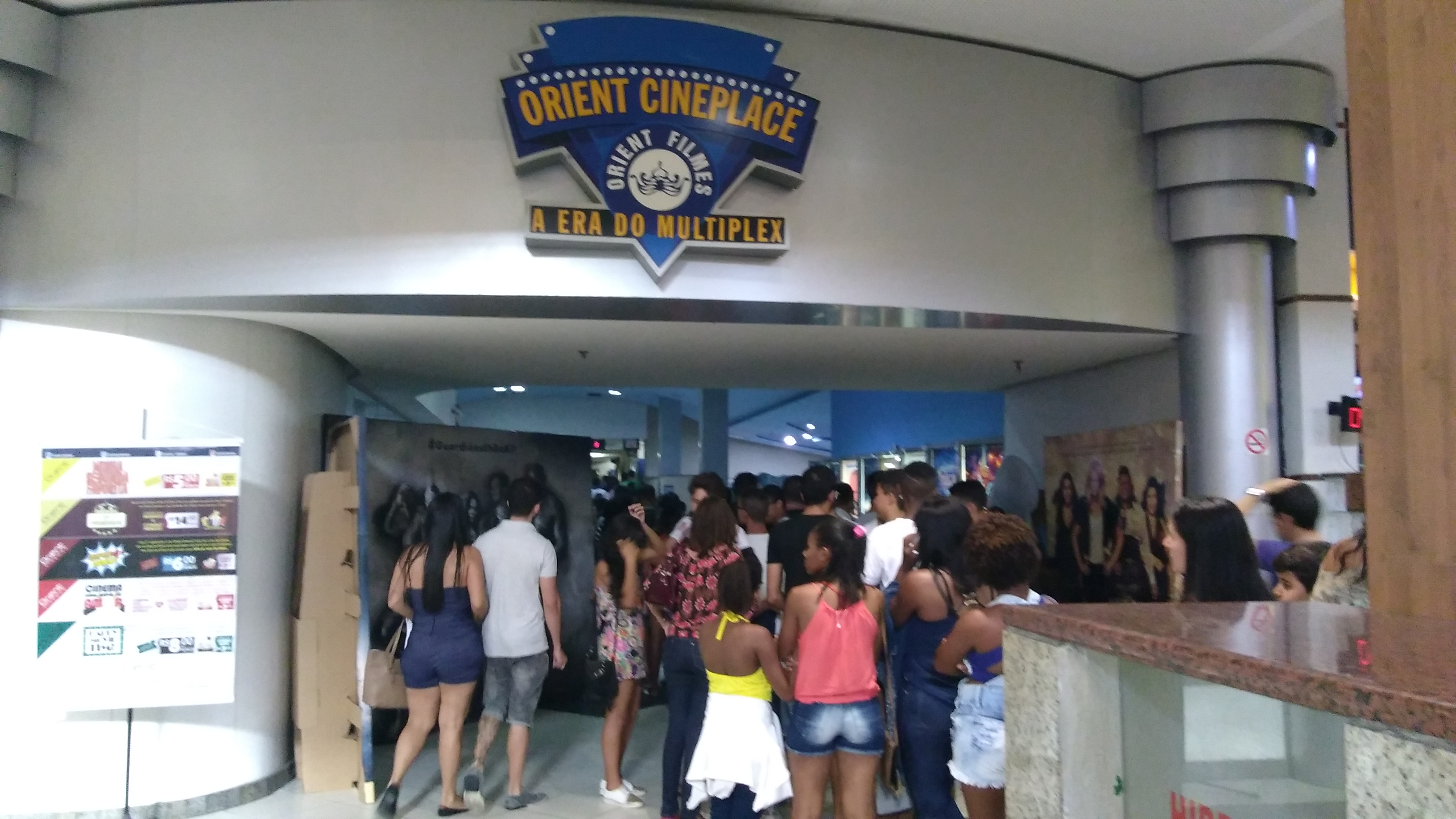 Área externa do Orient Cinemas Feira de Santana